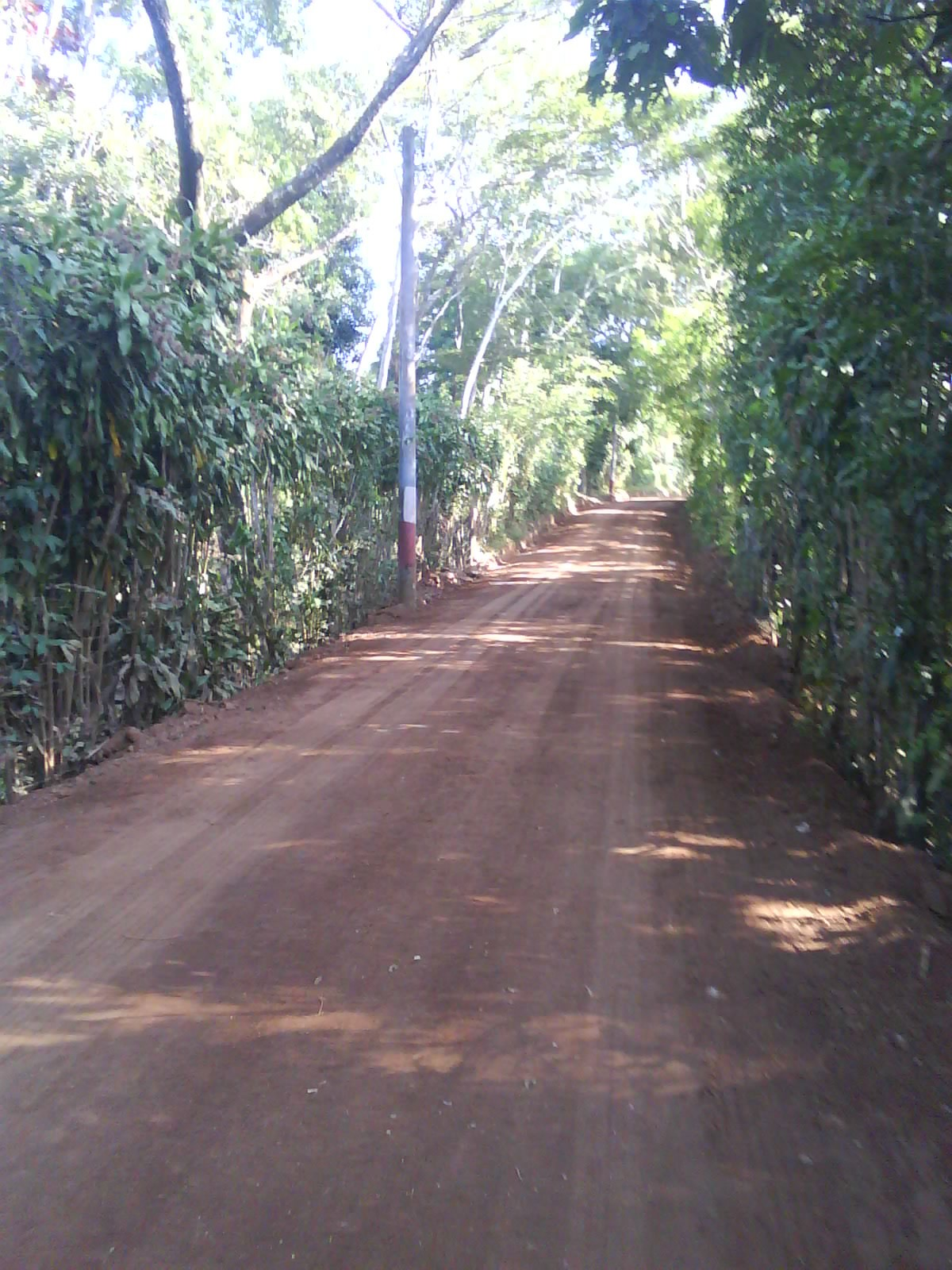 Camino de canton Amaquilco, Huizucar